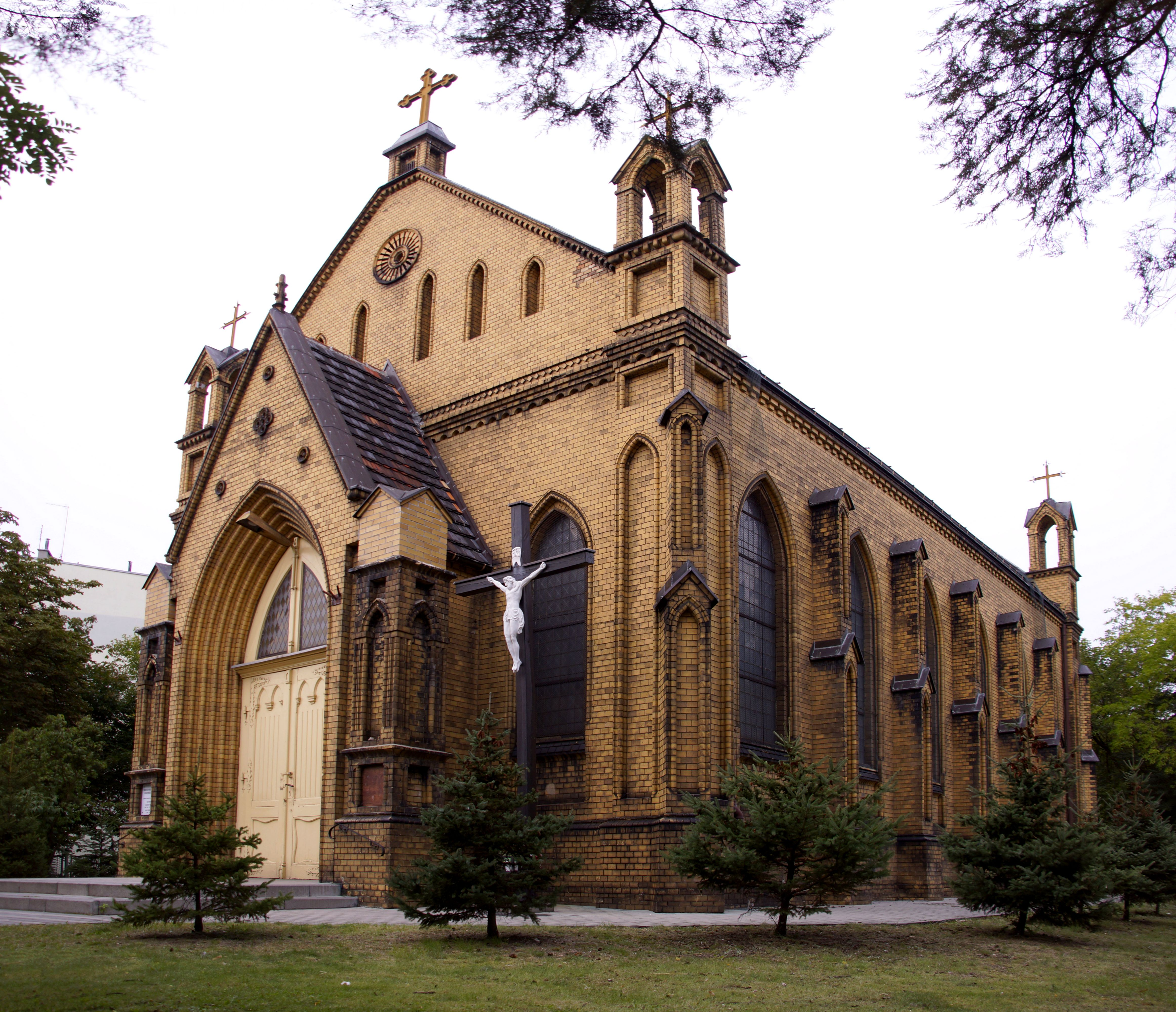 Dawny kościół ewangelicki, obecnie rzymskokatolicki filialny p.w. św. Barbary, mur., 1910 Nowa Sól, ul. Św. Barbary (zabytek nr rejestr. 2213 z 5.05.1976)